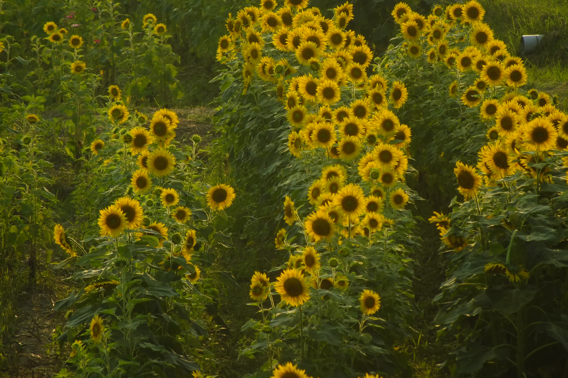 2017-07-15 Ono-himawarino-oka-park (小野市立ひまわりの丘公園)